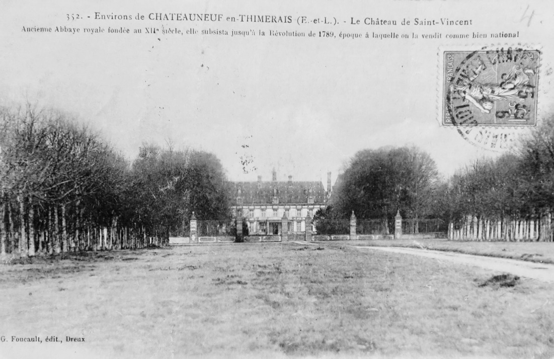 carte postale ancienne (ca 1900) représentant le château de Saint-Vincent, Saint-Maixme-Hauterive, Eure-et-Loir, France.